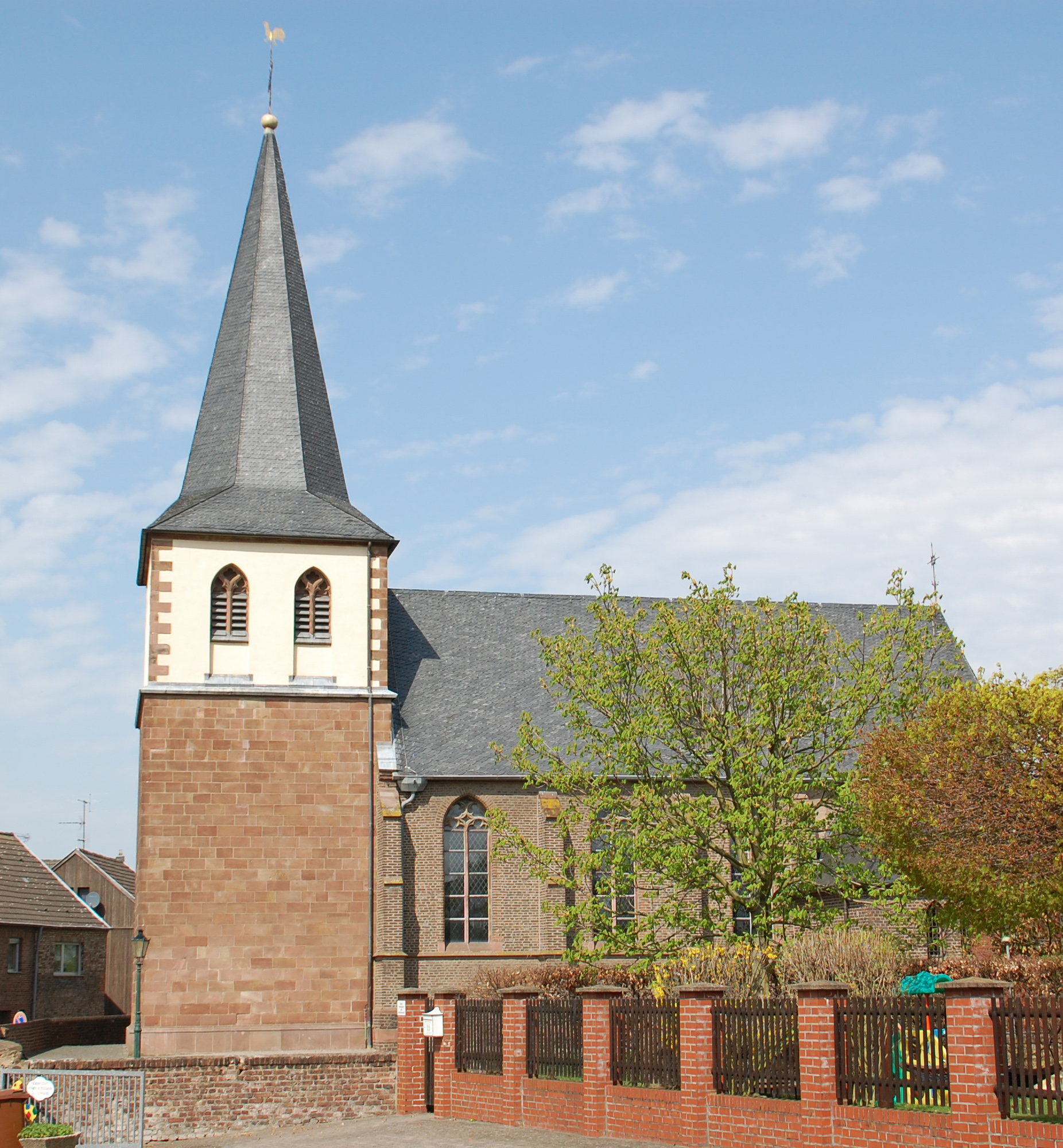 St. Dionysius in Sindorf-Heppendorf, Kerpen, Germany